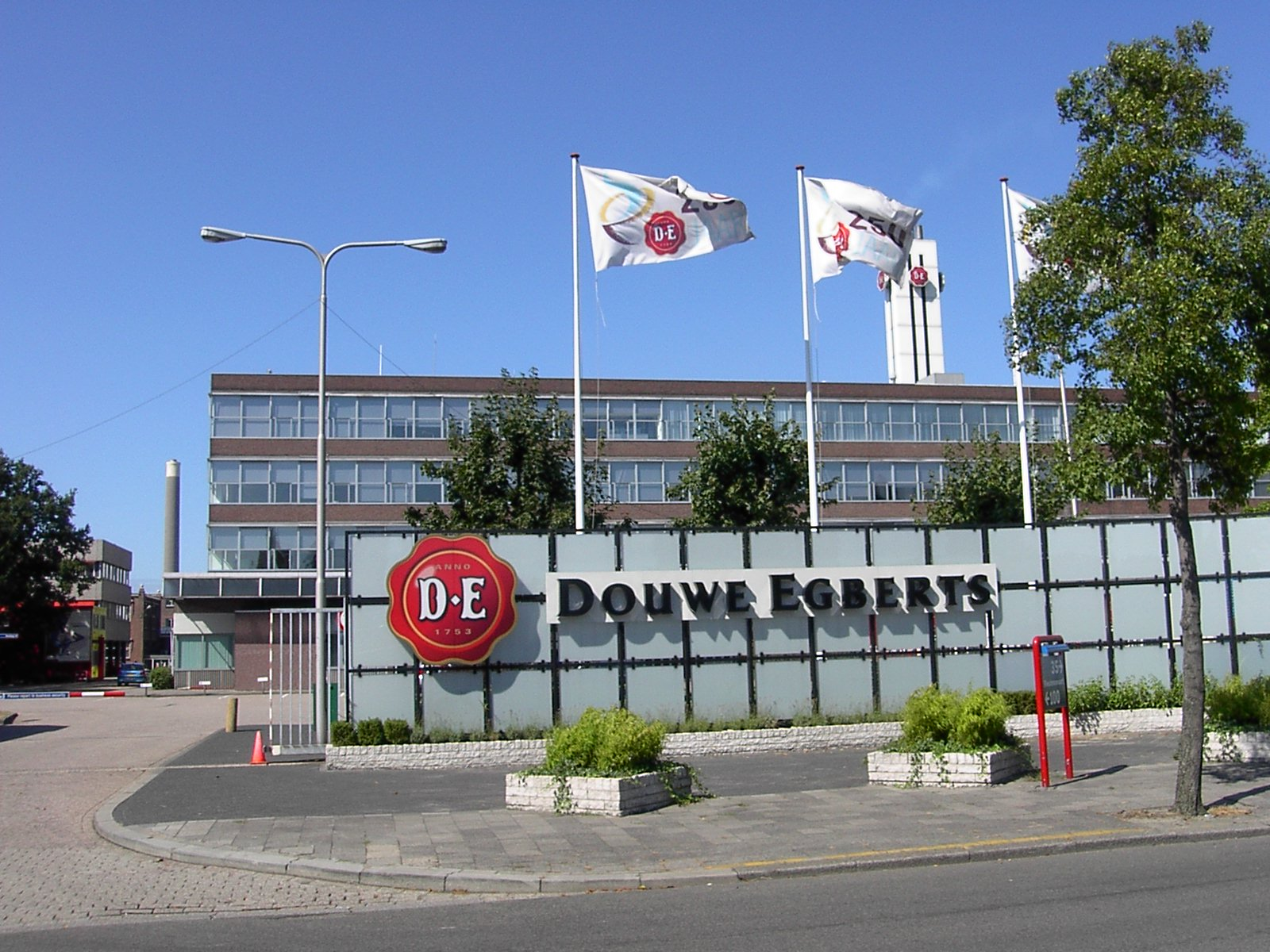 Douwe Egberts-fabriek in Utrecht-West. Gemaakt Augustus 2003 door Thijs Kinkhorst.